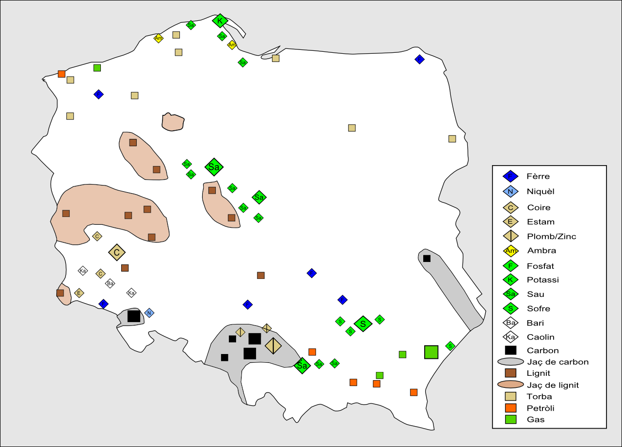 Esquèma generau dei ressorsas naturalas de Polonha.